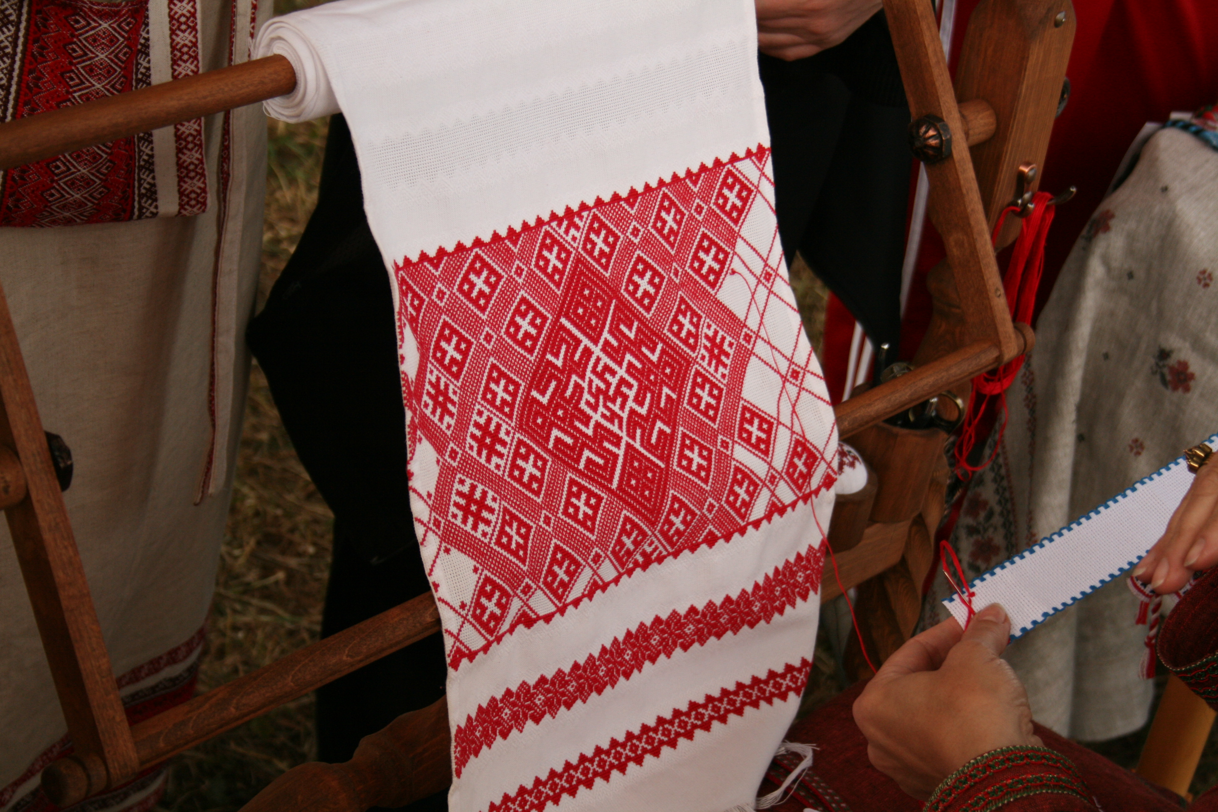 Праздник Ивана Купалы в родовом поселении «Серебряный бор», Белгородская область.